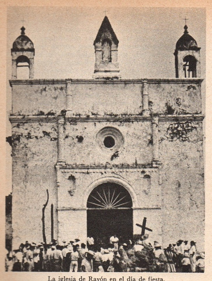 Fachada del templo de San Bartolomé Apóstol